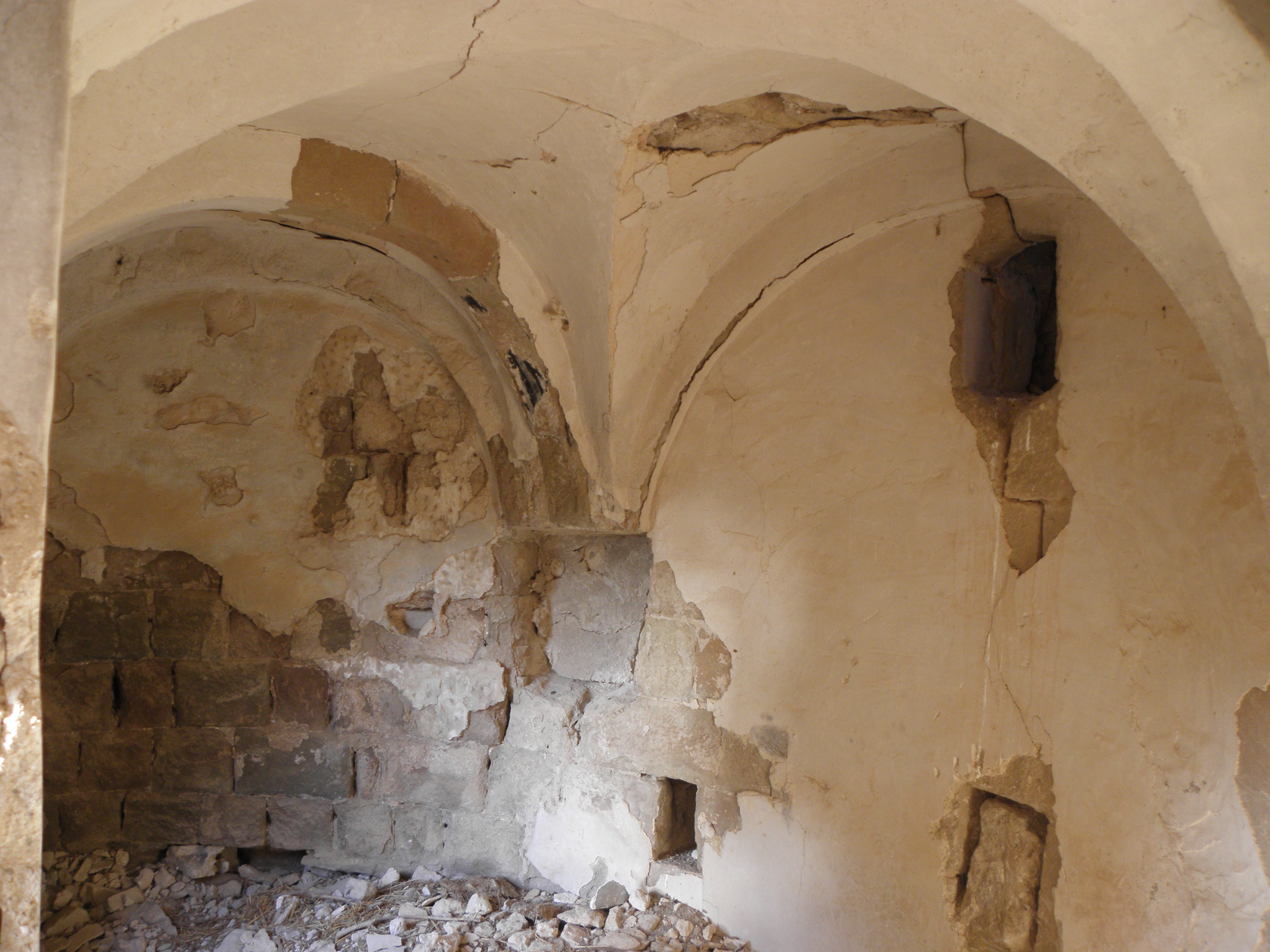 Esglesia romànica de Sant Pere de Madrona (Pinell de Solsonès). Part de la cripta amb que conserva el sostre.